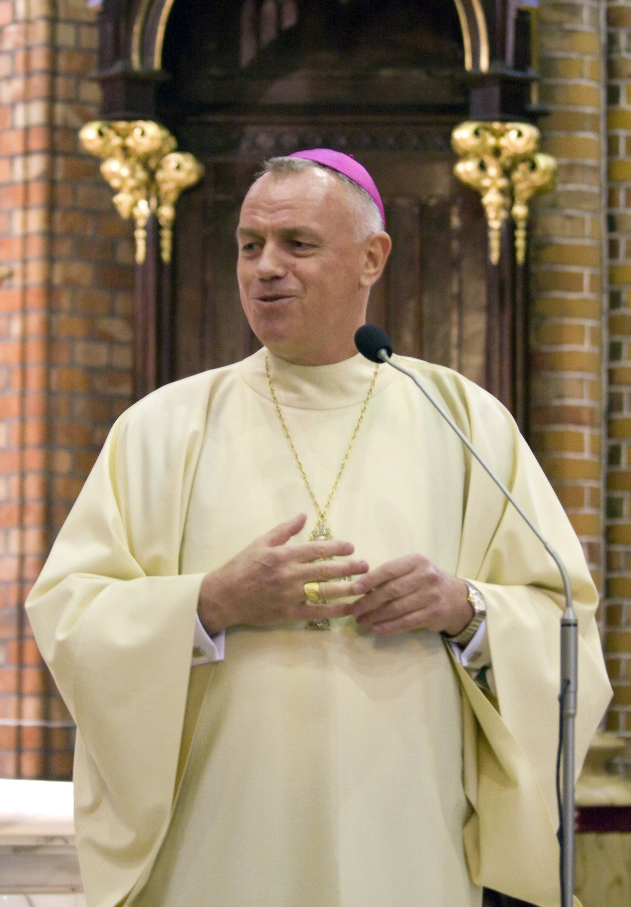 Katecheza bp. Kiernikowskiego, XXIII Światowe Dni Młodzieży - Eucharystia Młodych, obchody w diecezji siedleckiej